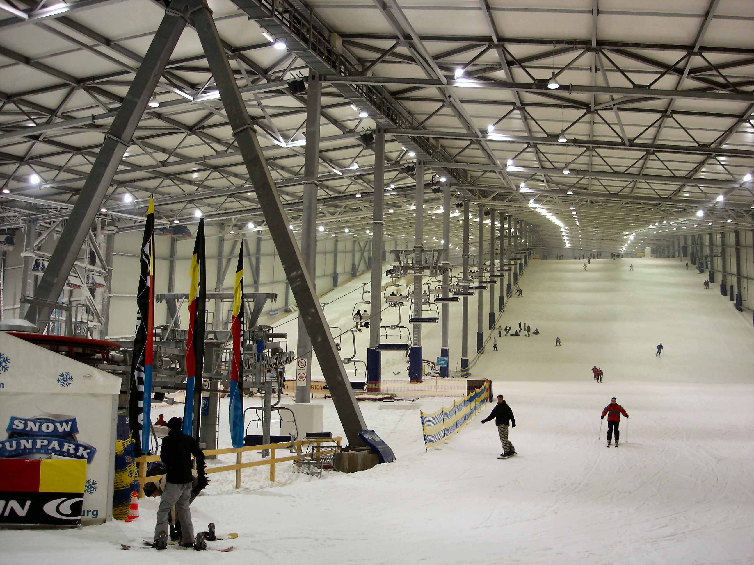 alpincenter Hamburg-Wittenburg in Wittenburg (Mecklenburg-Vorpommern)